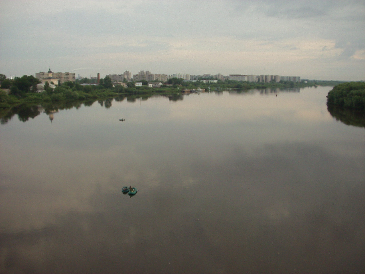 Volkhov River in Velikiy Novgorod